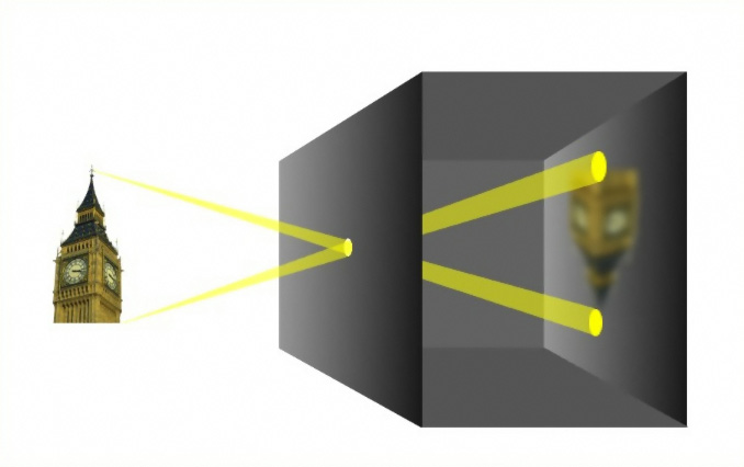 Funktionsweise einer Lochkamera Zeichner: Anton (rp) 2004 Nutzungsrechte freigegeben: GNU Free Documentation License.